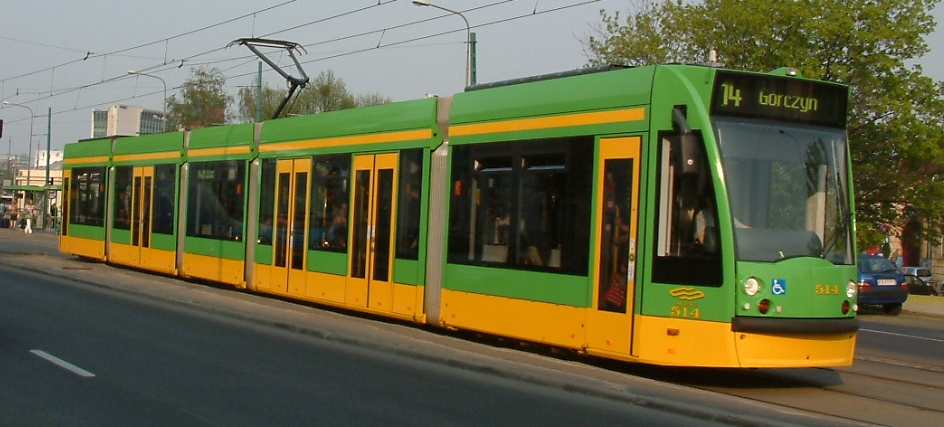 Combino, Poznań, Głogowska Str.